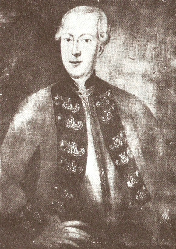 Georg Ludwig von Köller-Banner (1728-1811), königlich dänischer General der Infanterie, Gutsbesitzer in Pommern und Träger des dänischen Danebrog-Ordens